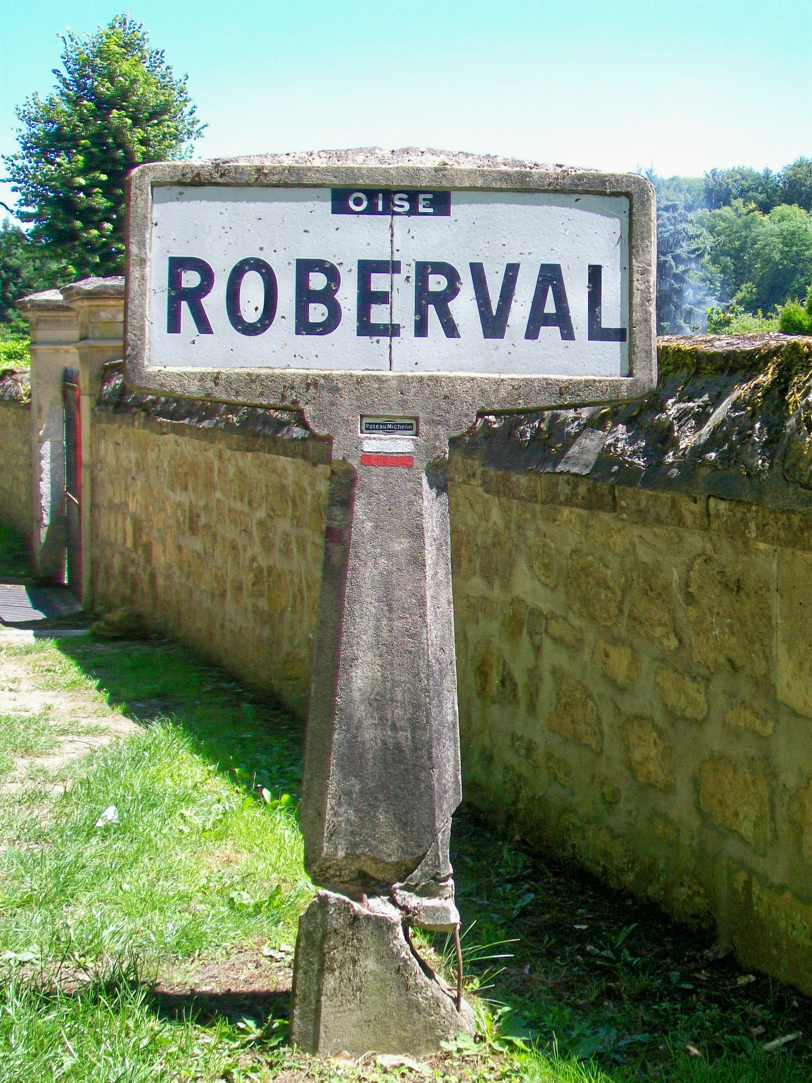 Poteau Michelin sur le chemin d'Harcelay, en provenance de Pontpoint ; ce type de poteaux a été fabriqué avant la Seconde Guerre mondiale.